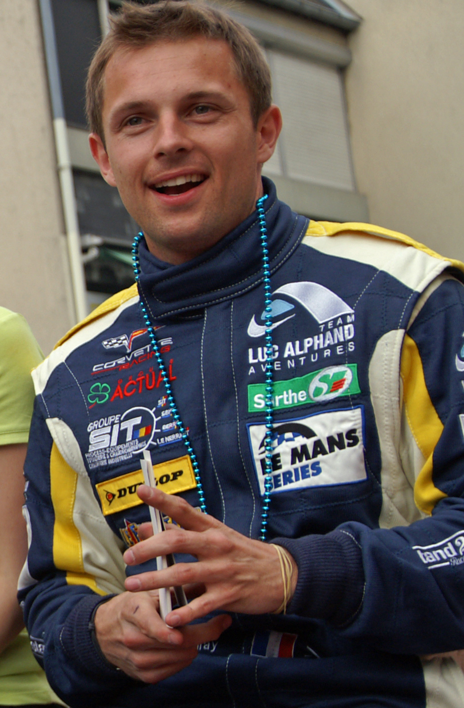 Yann Clairay aux 24 heures du Mans 2009